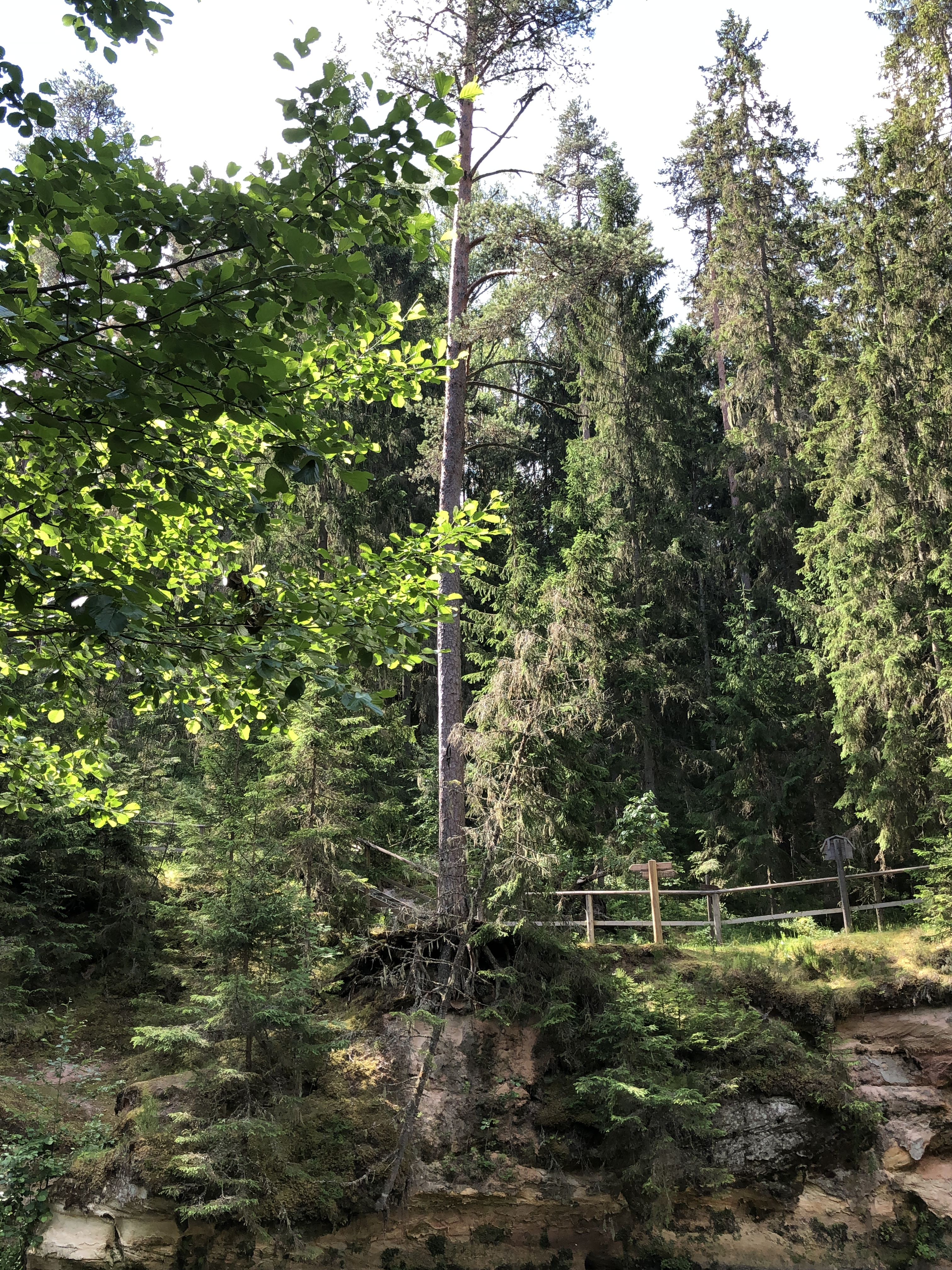 Väike Taevaskoda, Gabrieli mänd